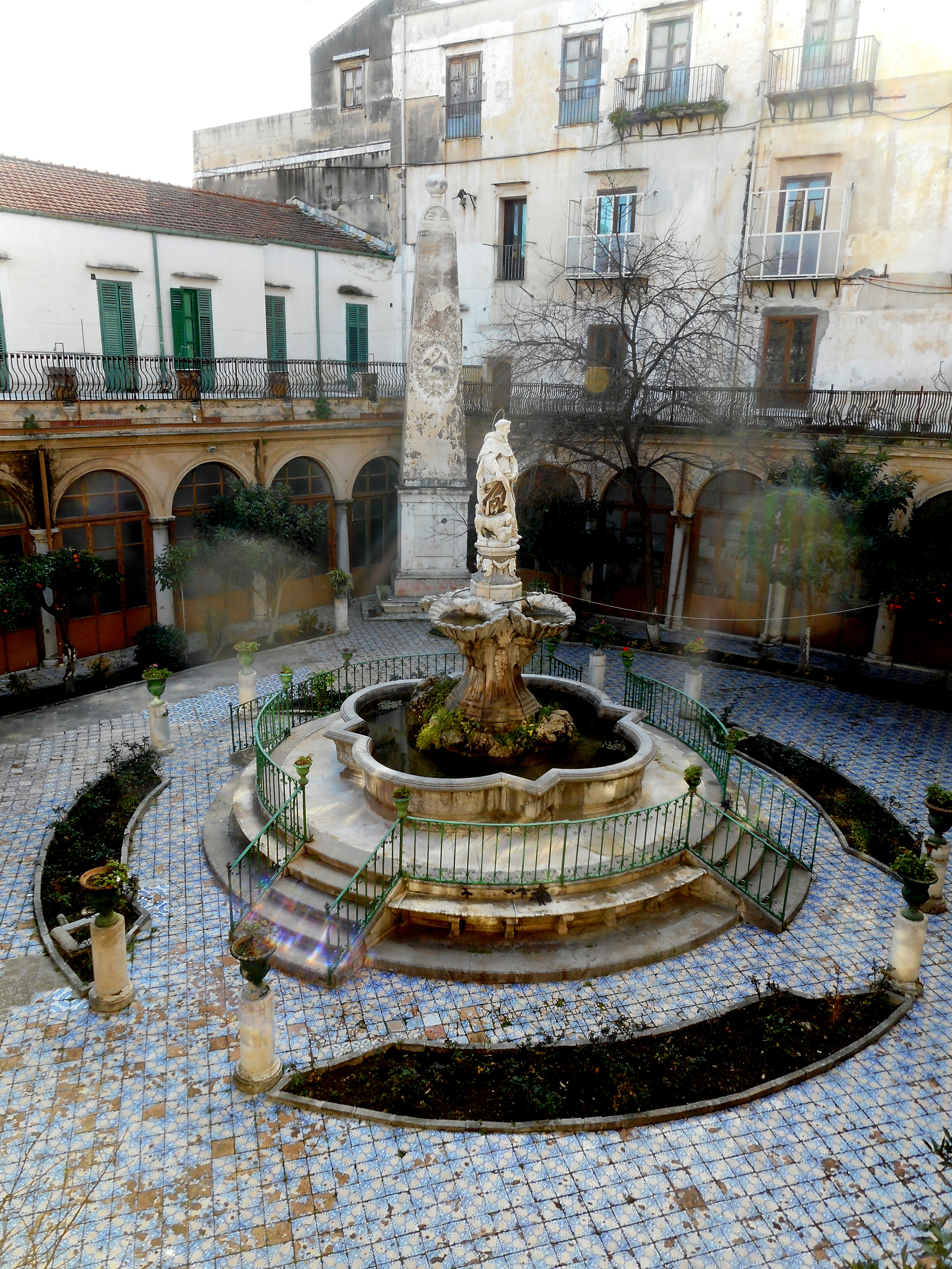 Chiostro e fontana di San Domenico di Ignazio Marabitti, monastero di Santa Caterina.